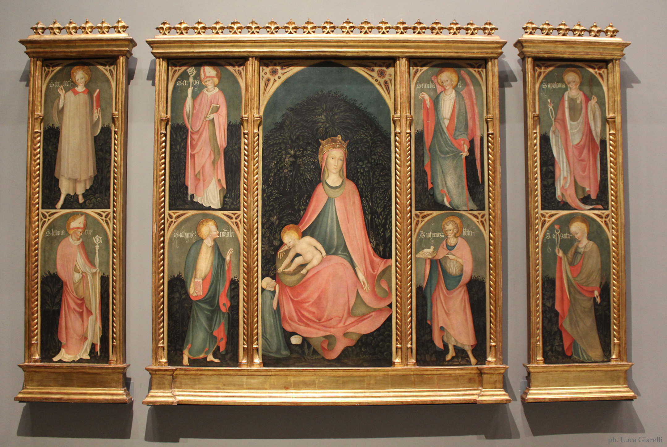 Polittico di Cemmo (Paroto o Pasoto) - Pinacoteca Tosio Martinengo - Brescia